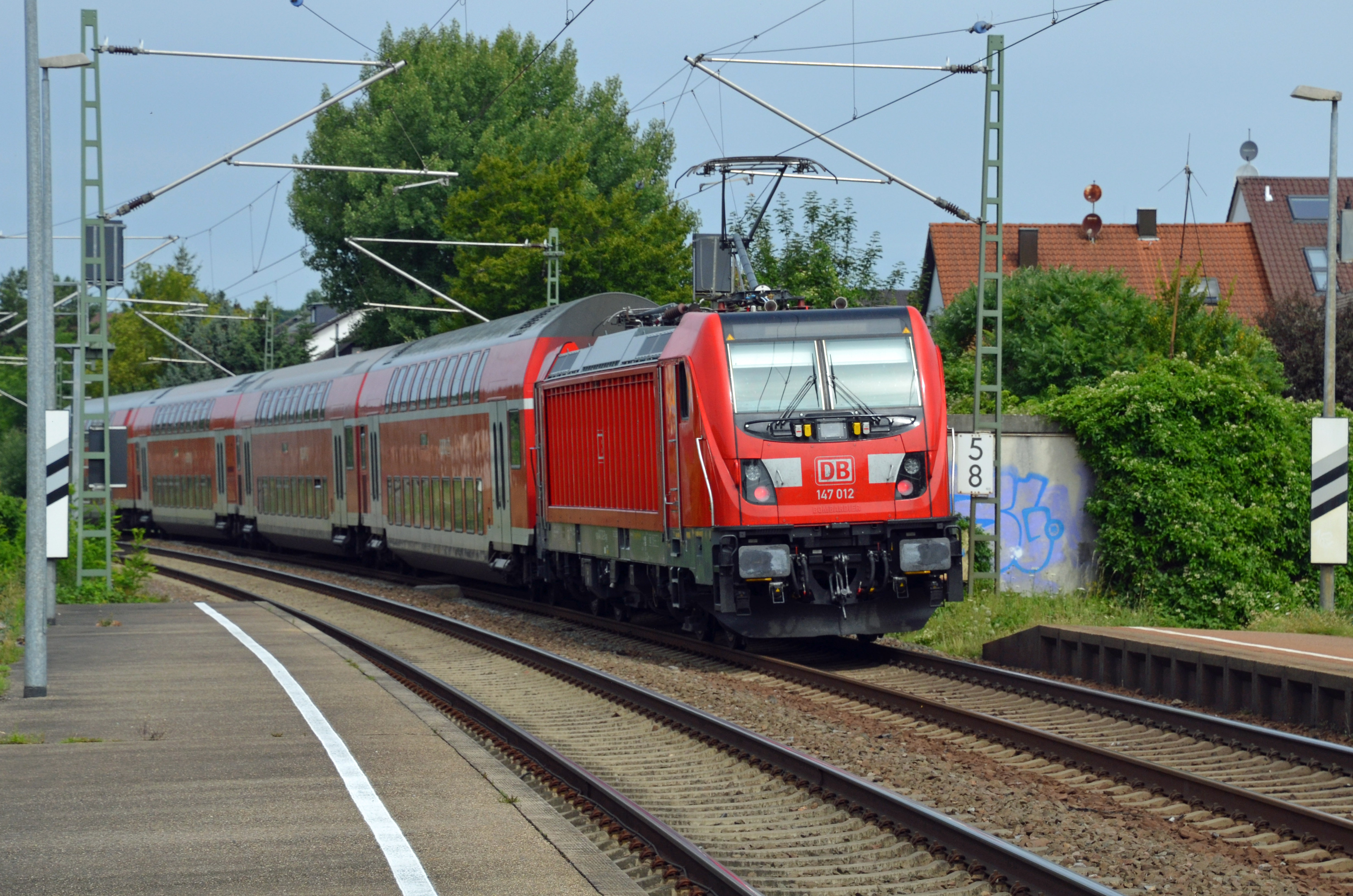 Nachschuss auf Lok 115 114 der Deutschen Bahn AG mit dem RE 19504 (Stuttgart–Heidelberg) in Heidelsheim.